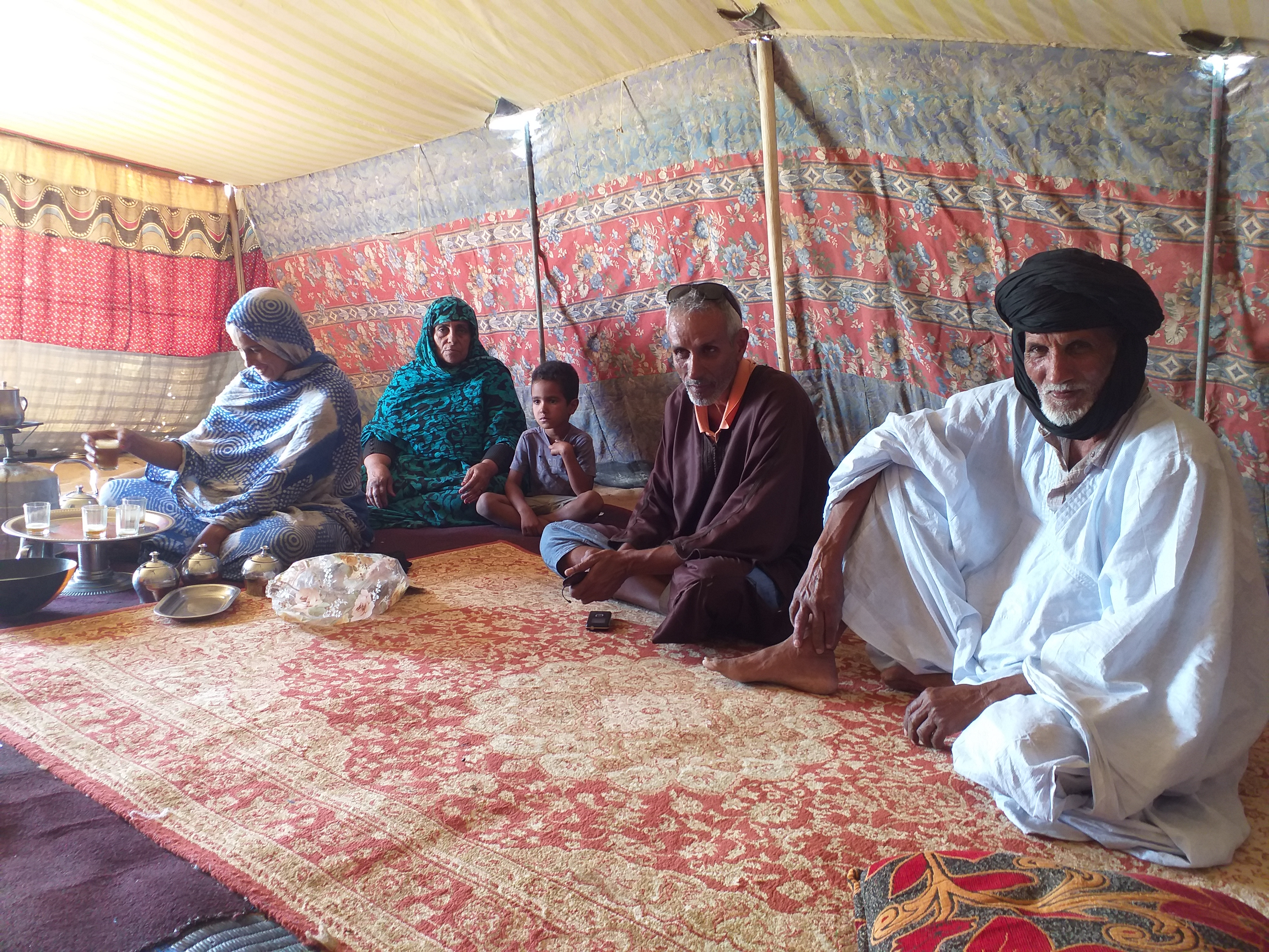 Fa caldo, ci fermiamo per il thè in una tenda di pastori in Mauritania.